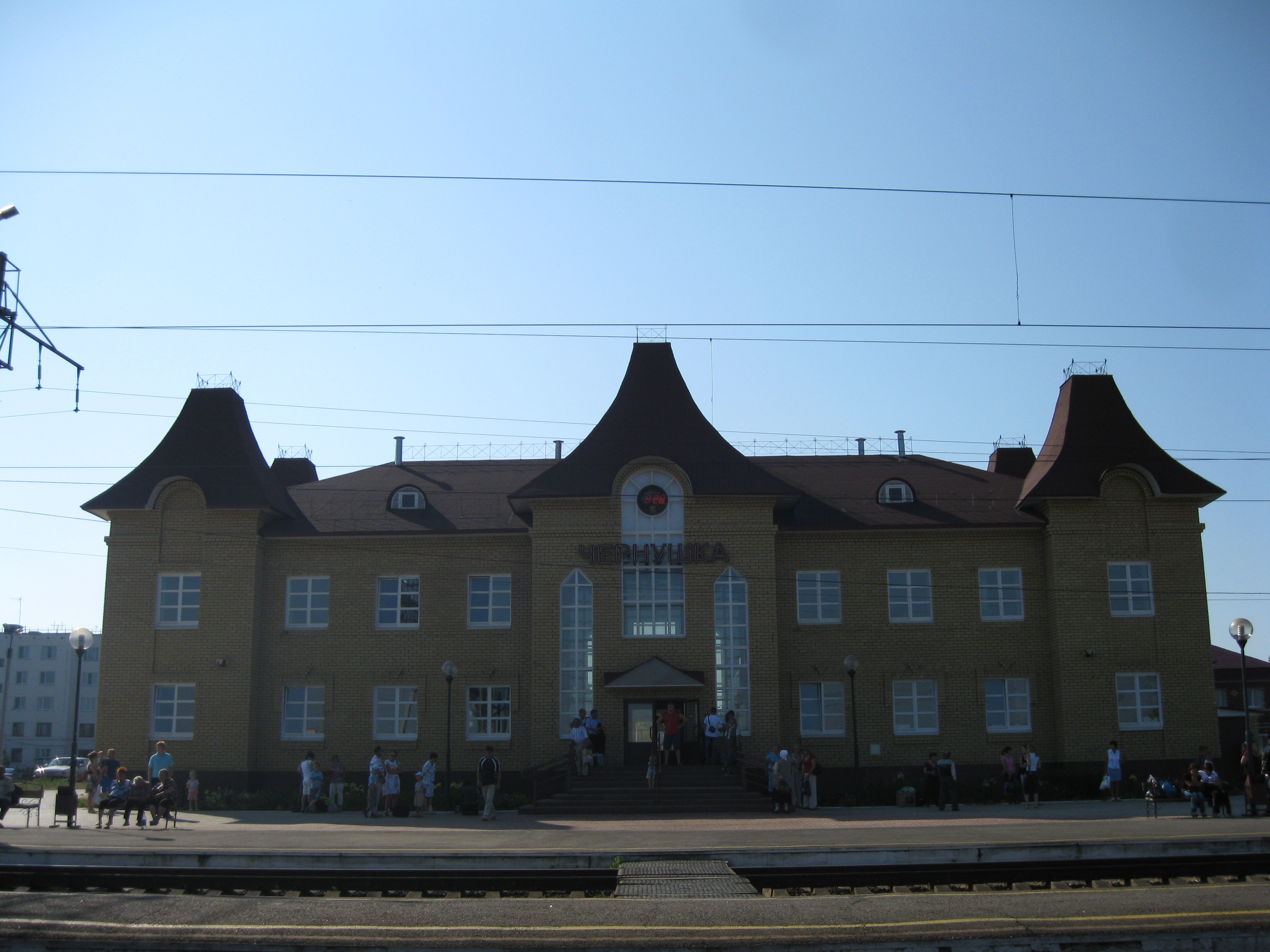 Здание железнодорожного вокзала в г.Чернушка. (Фасад со стороны железнодорожных путей).